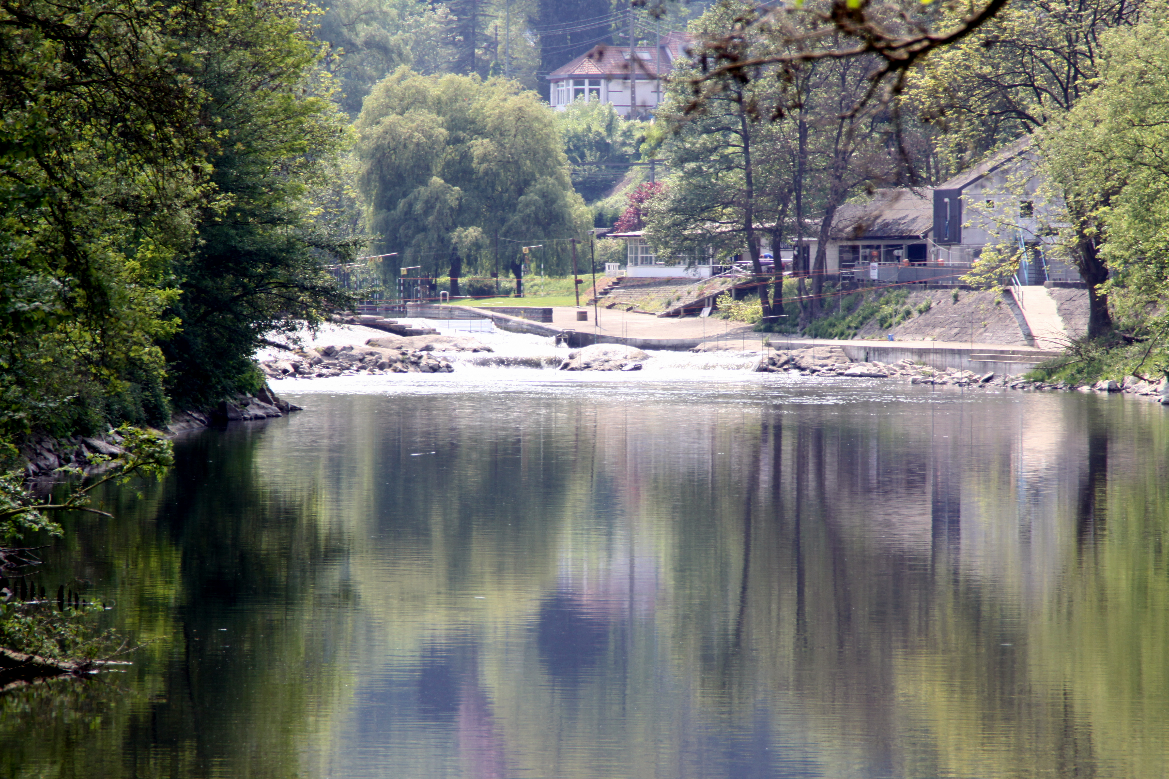 Den Däich bei der Schleis Sauheid